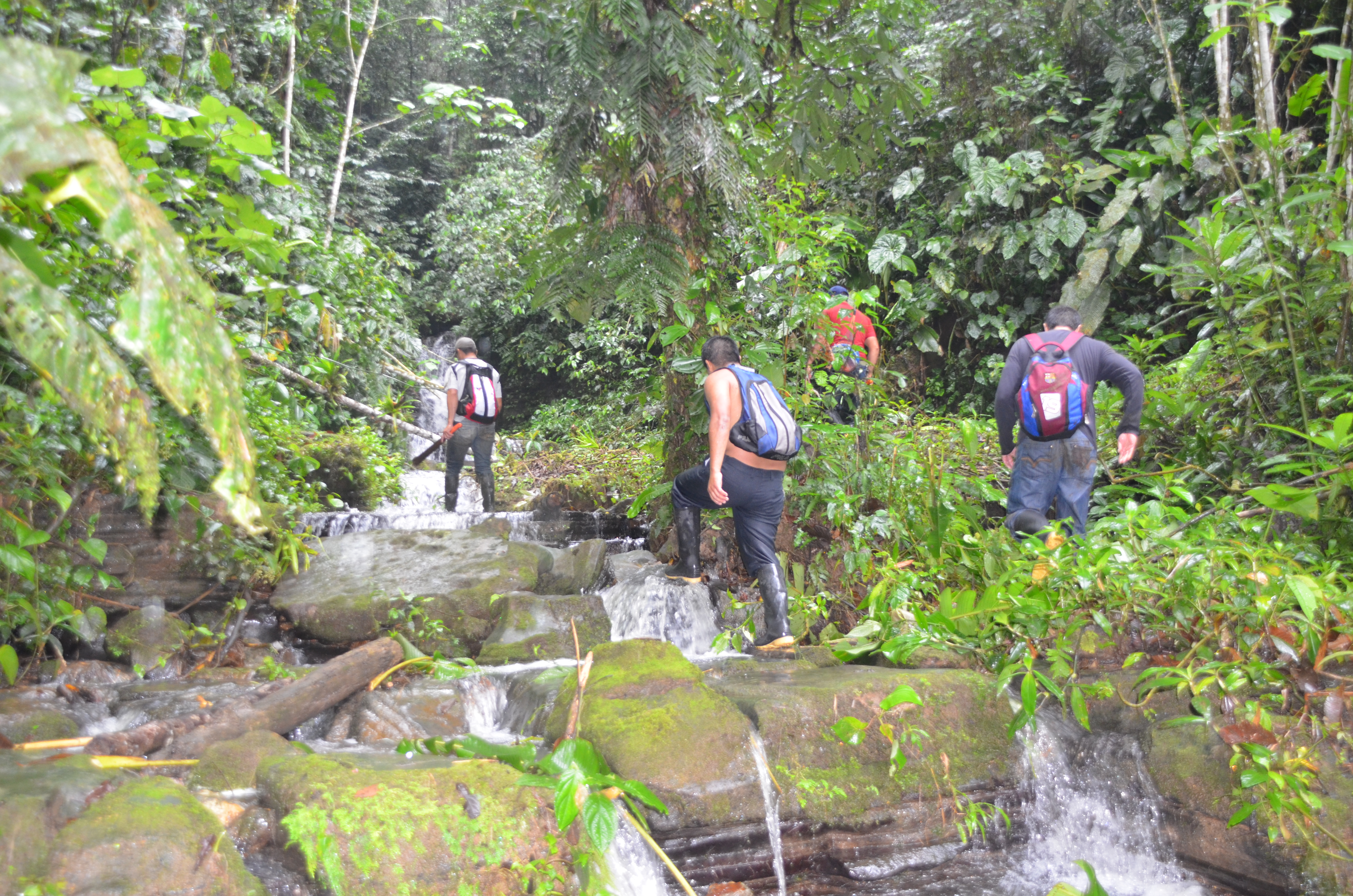 Caminata en Cascadas del valle misterioso, Huambi, Sucua, Ecuador